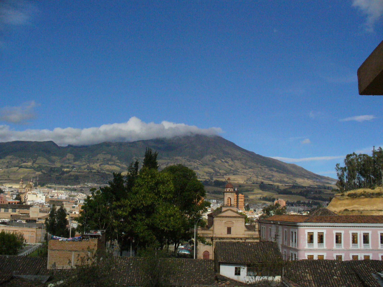 San Juan de Pasto, Nariño, Colombia. Volcan Galeras